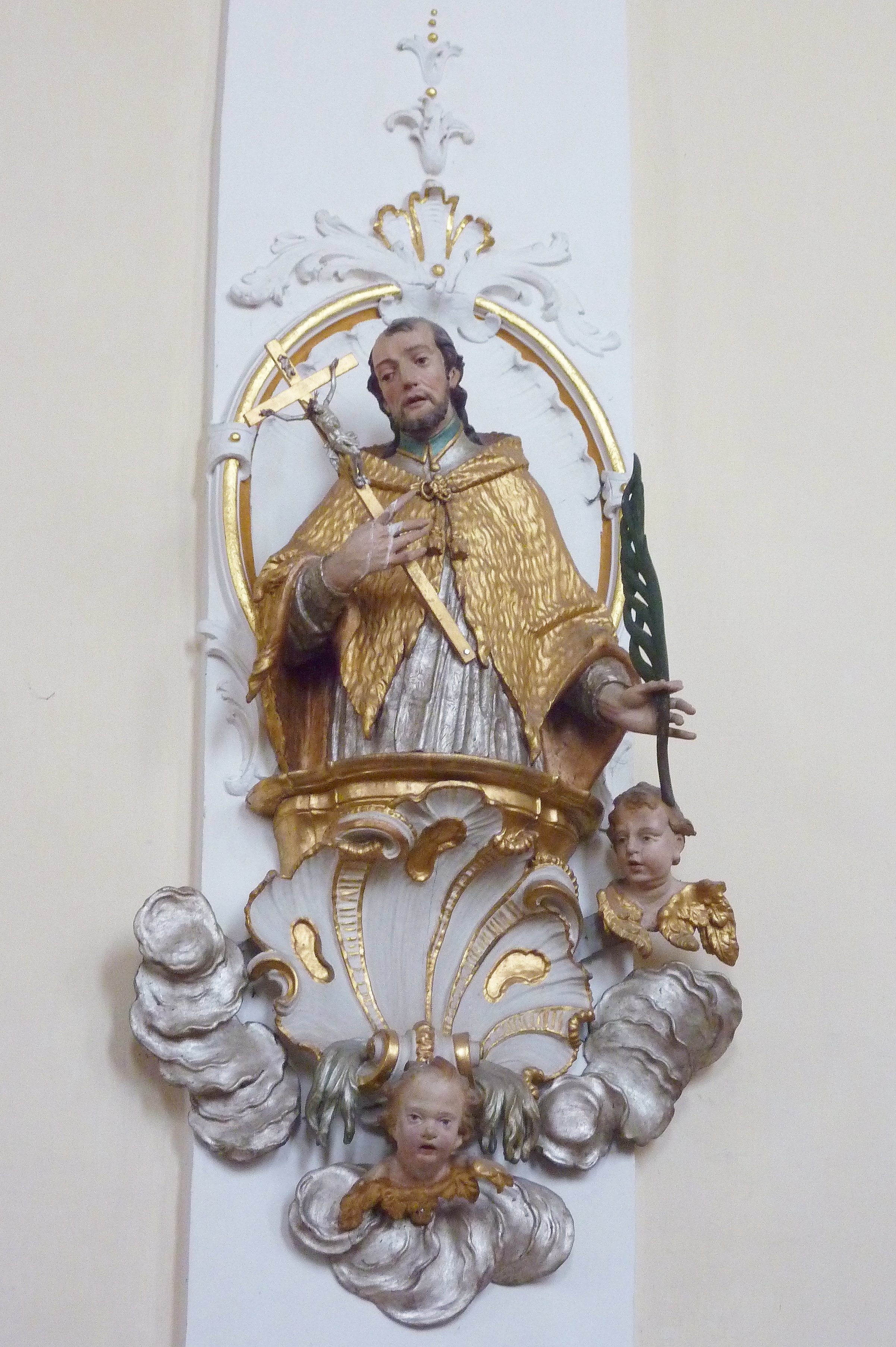 Katholische Pfarrkirche, ehemalige Kloster- und Wallfahrtskirchellfahrtskirche St. Leonhard in Unterliezheim, einem Ortsteil von Lutzingen im Landkreis Dillingen an der Donau (Bayern), Halbfigur des hl. Johannes Nepomuk (um 1735), vermutlich von Stephan Luidl